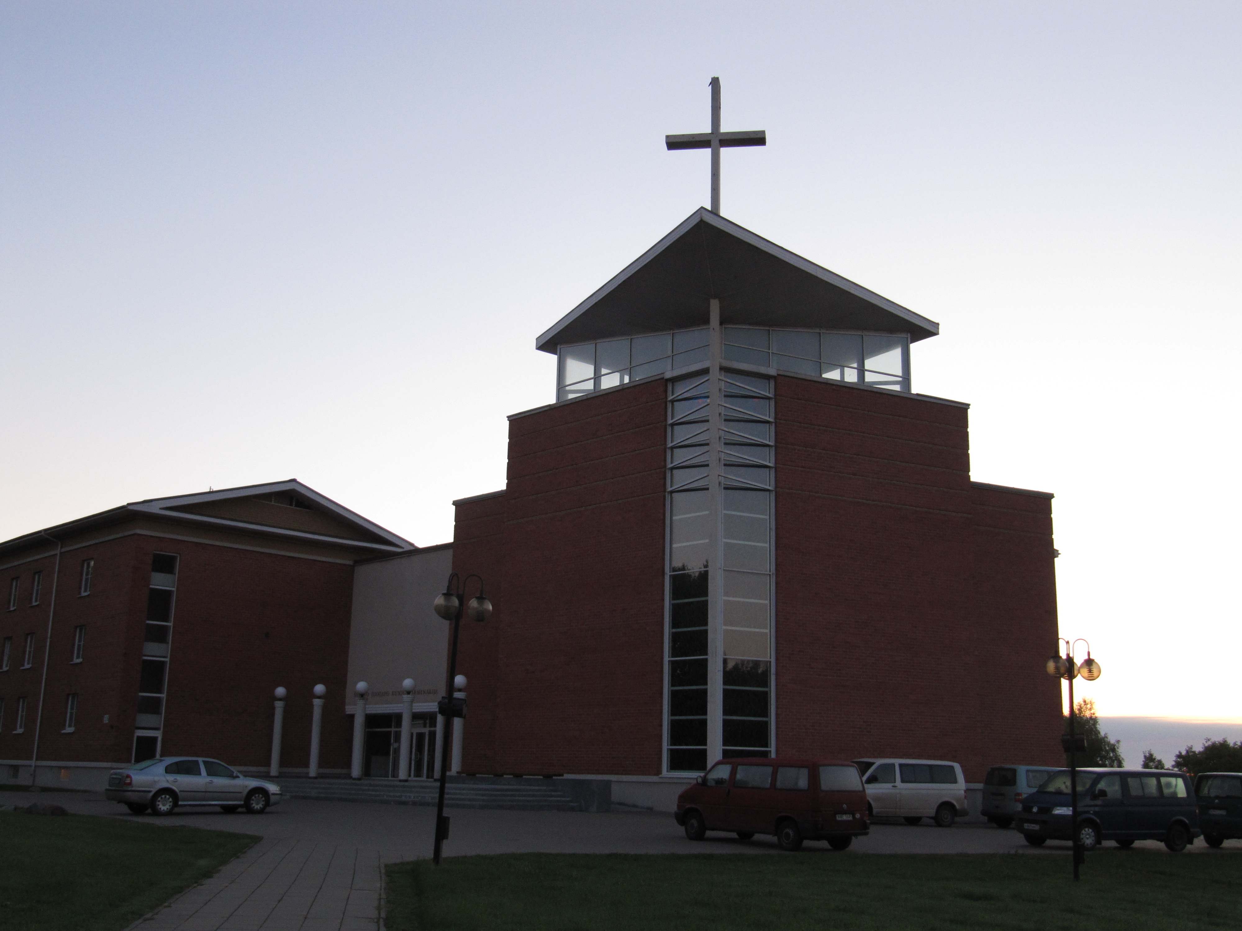 Католическая семинария святого Иосифа, Вильнюс